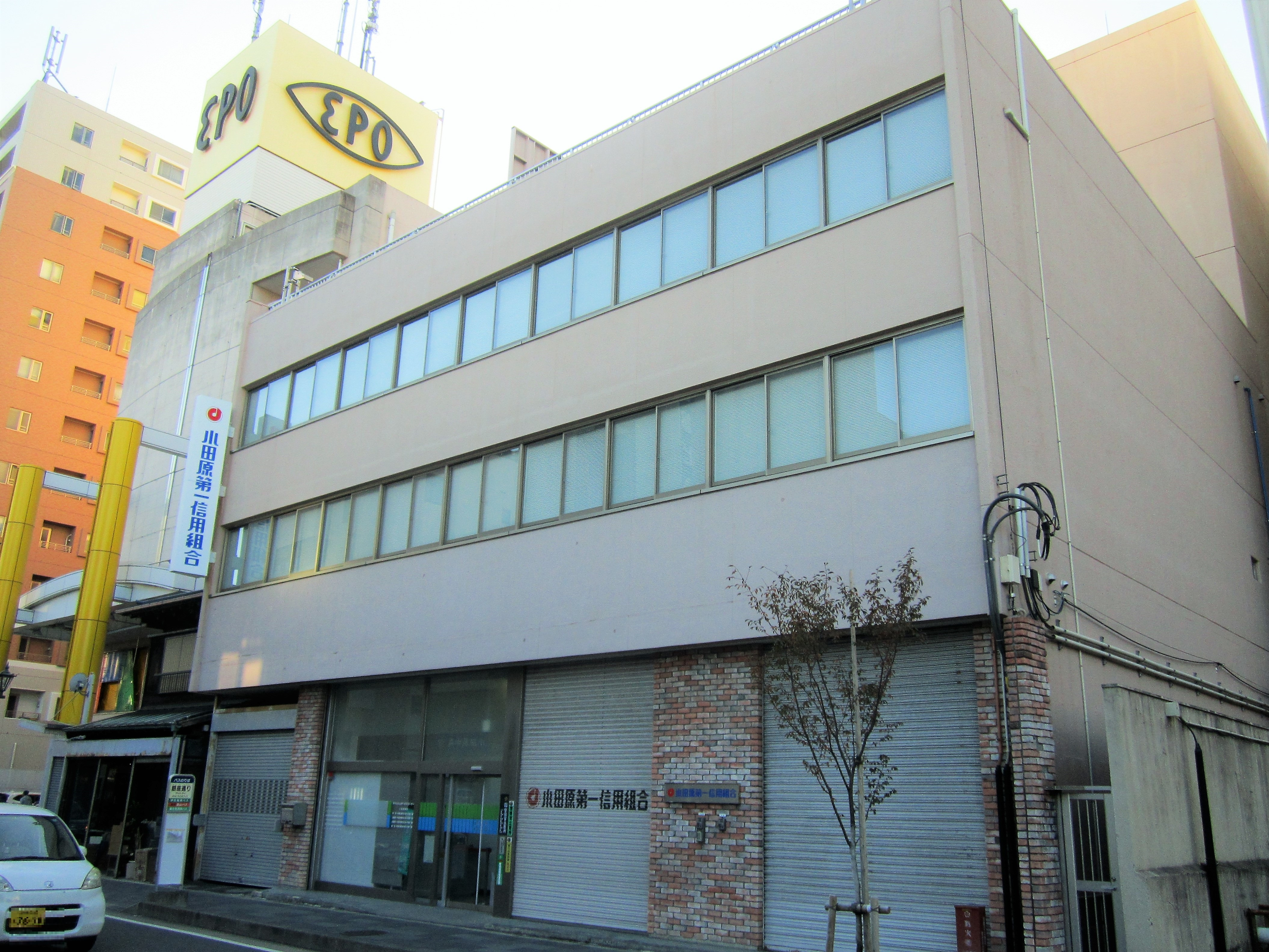 小田原第一信用組合 本店（小田原市栄町）